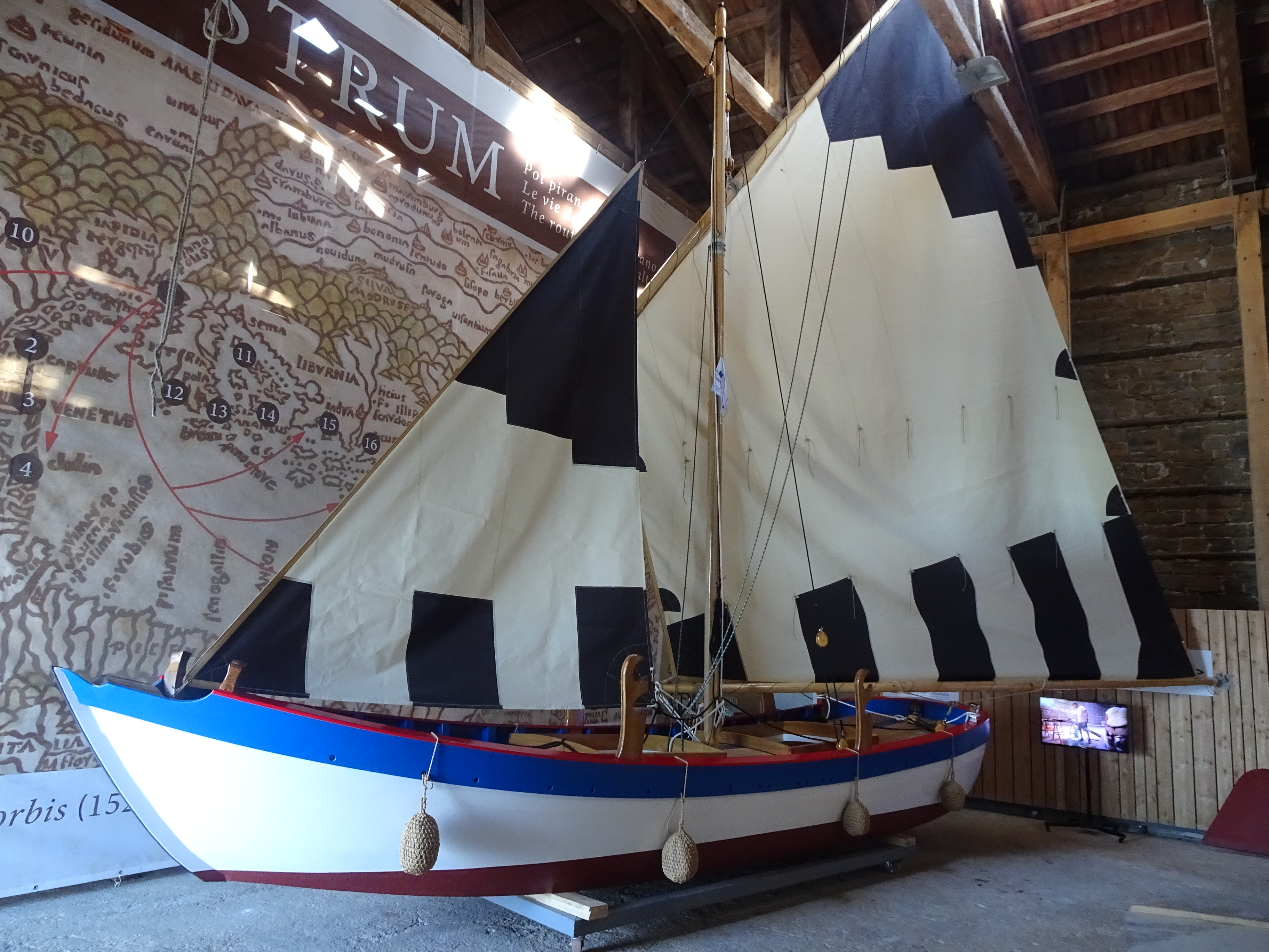 Istrski topo - replika